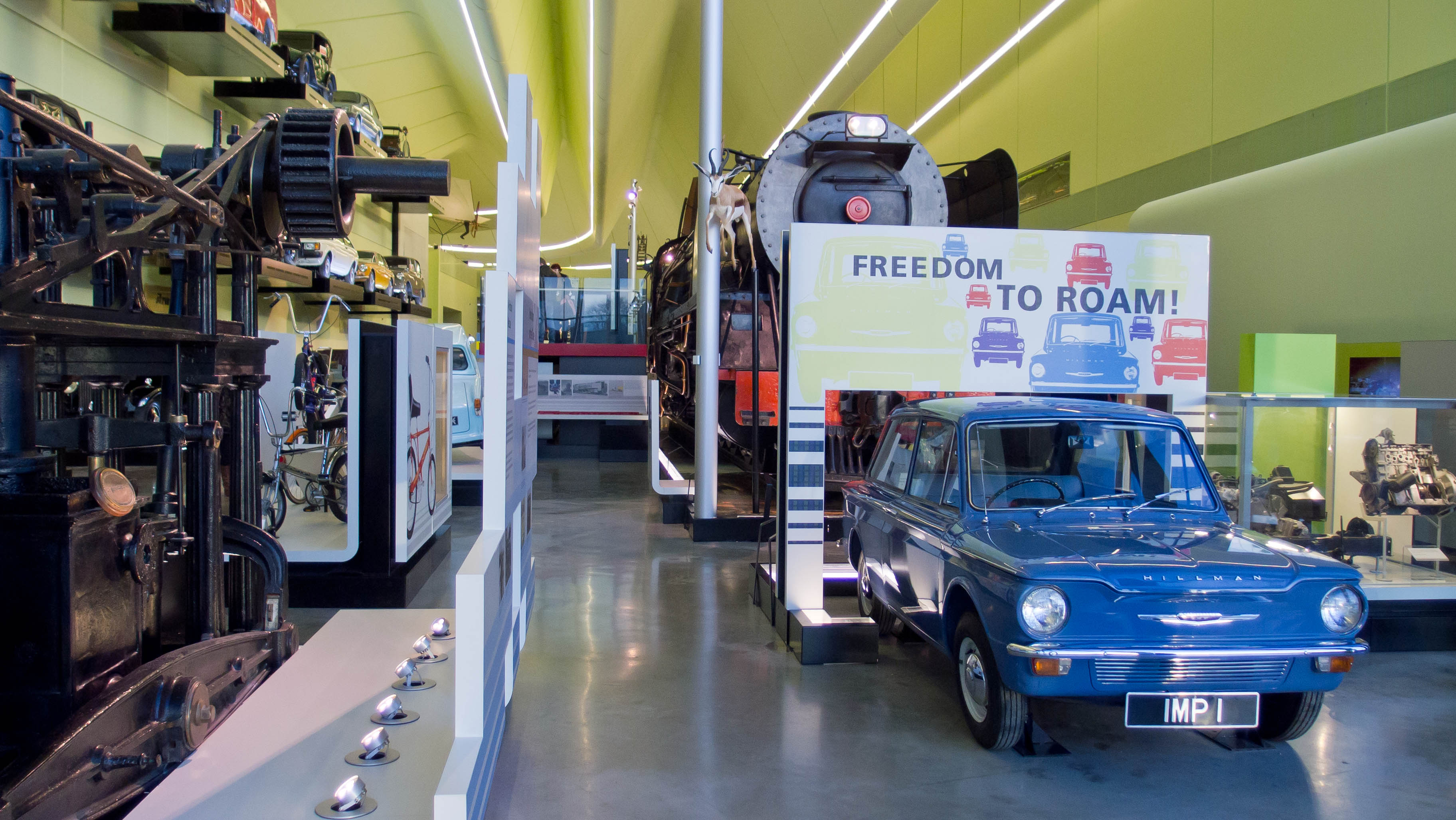 Riverside Museum, Glasgow